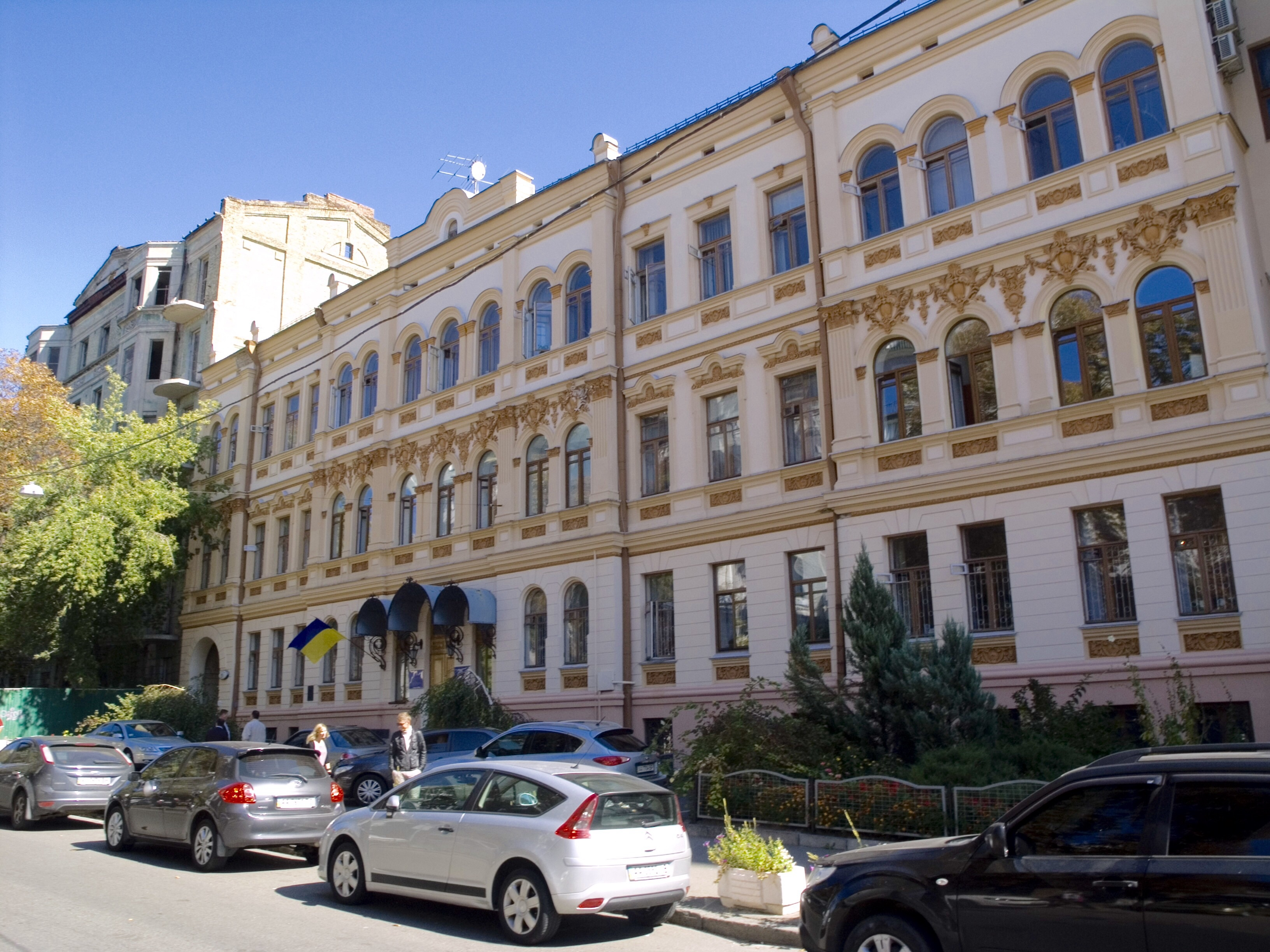 Україна, Київ - вул. Івана Франко, 19 - Будинок прибутковий